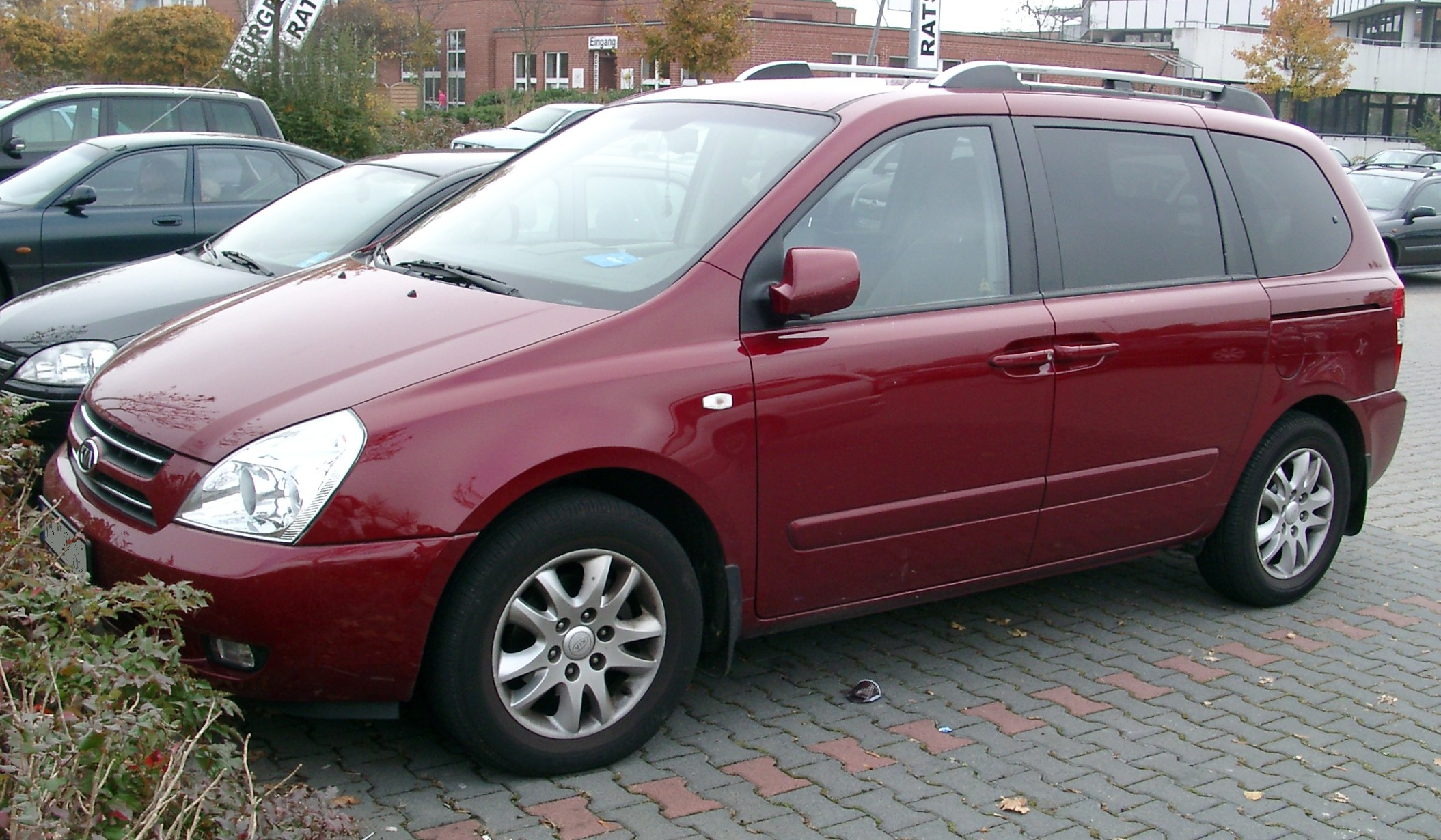 Kia Carnival